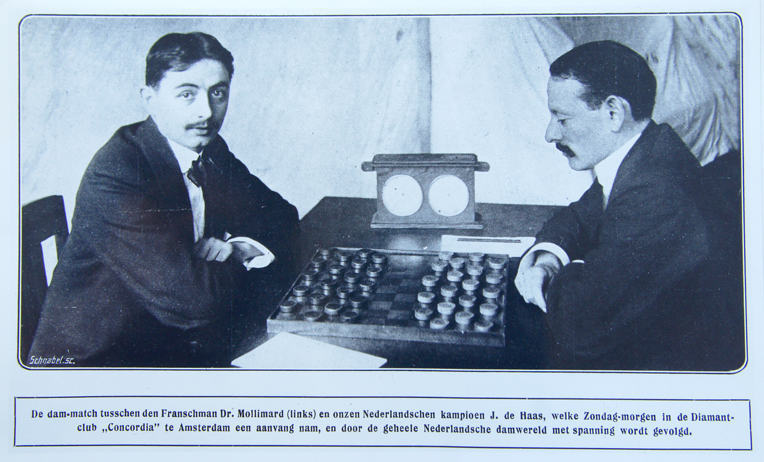 Матч А. Молимар (слева) - Я. де Гааз (справа), 1912 год